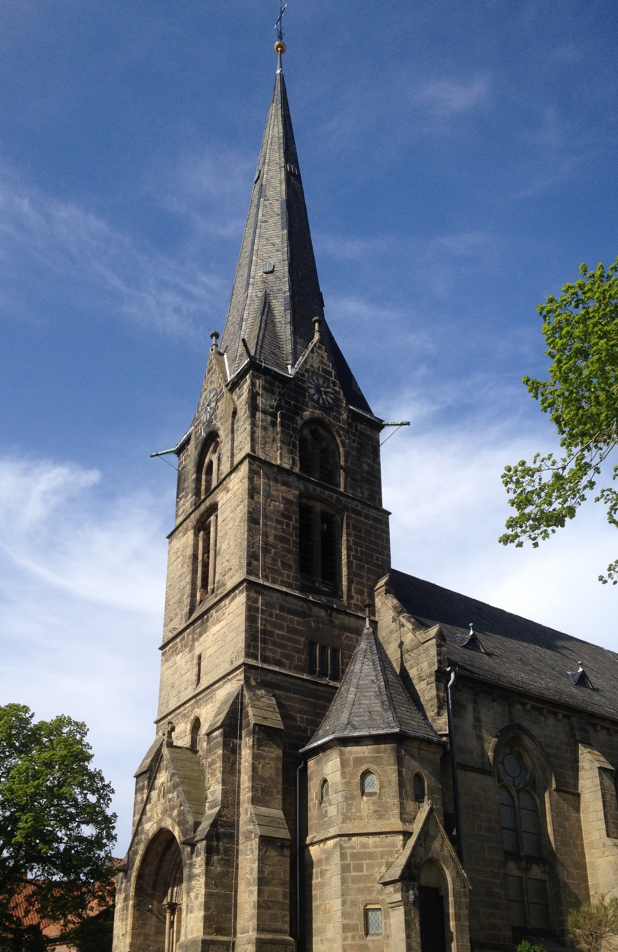 Othfresen, ev.-luth. Erlöserkirche